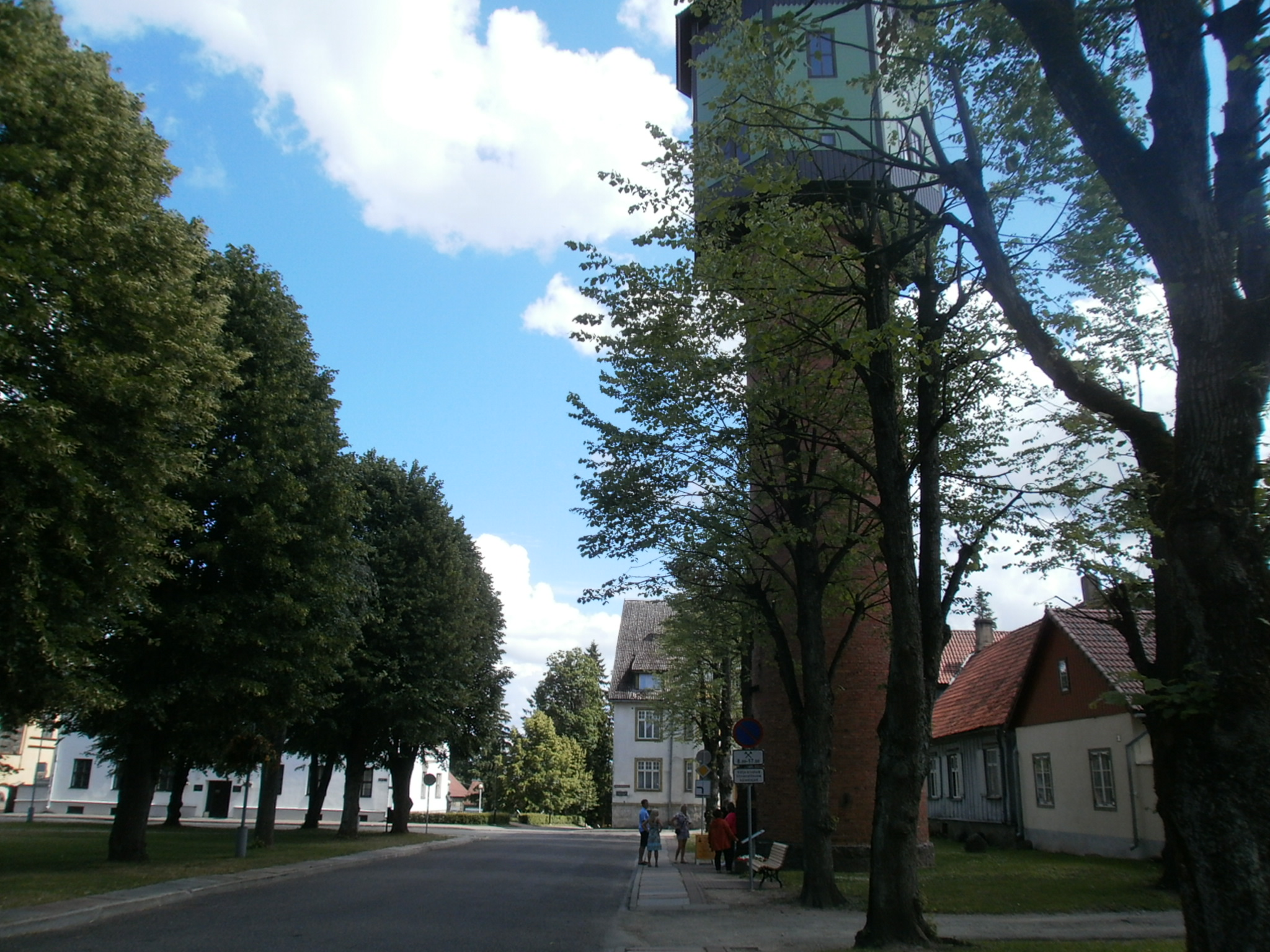 Tänav Trepimäele.